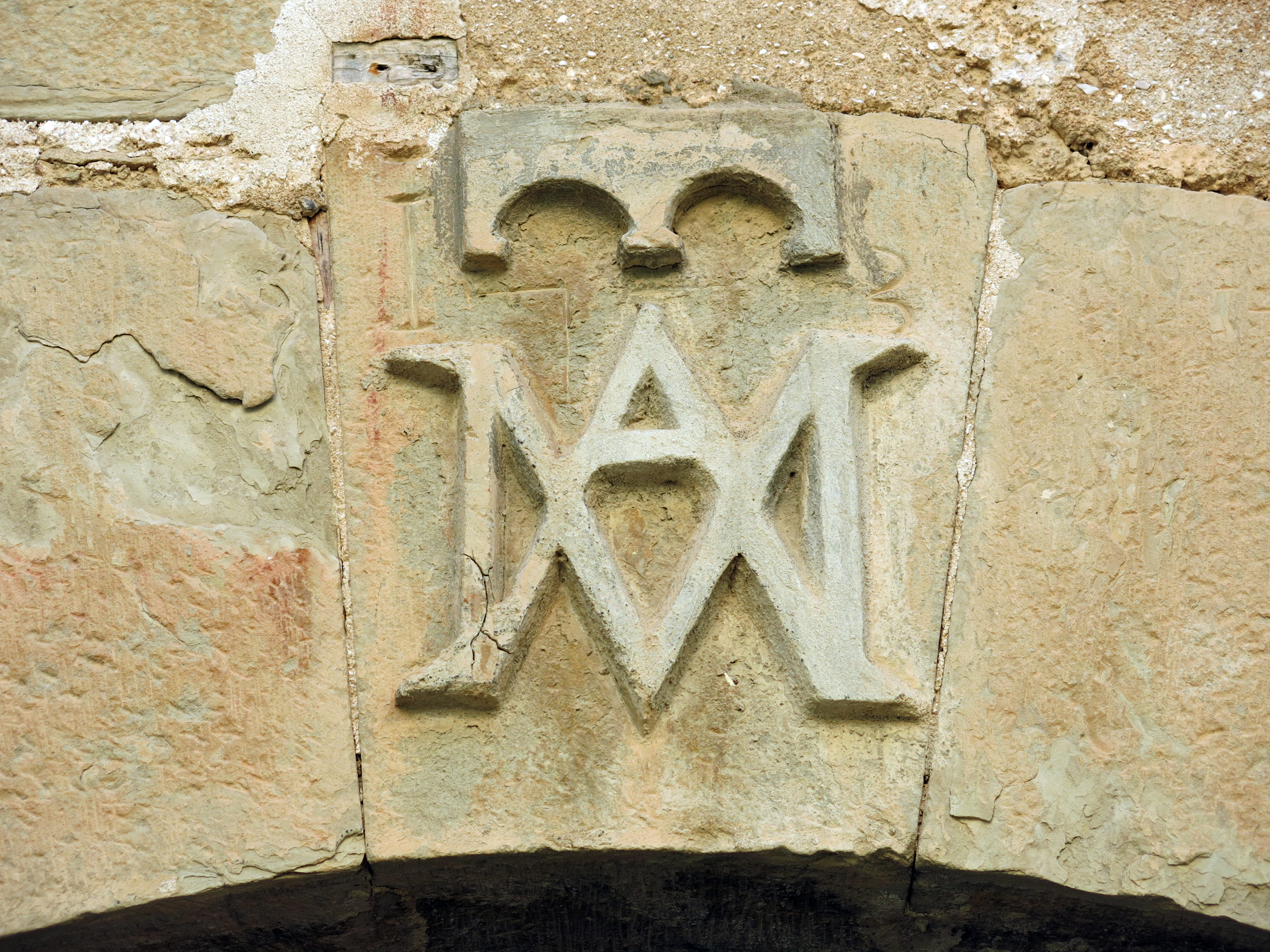 Cal Valeri (Montsonís)